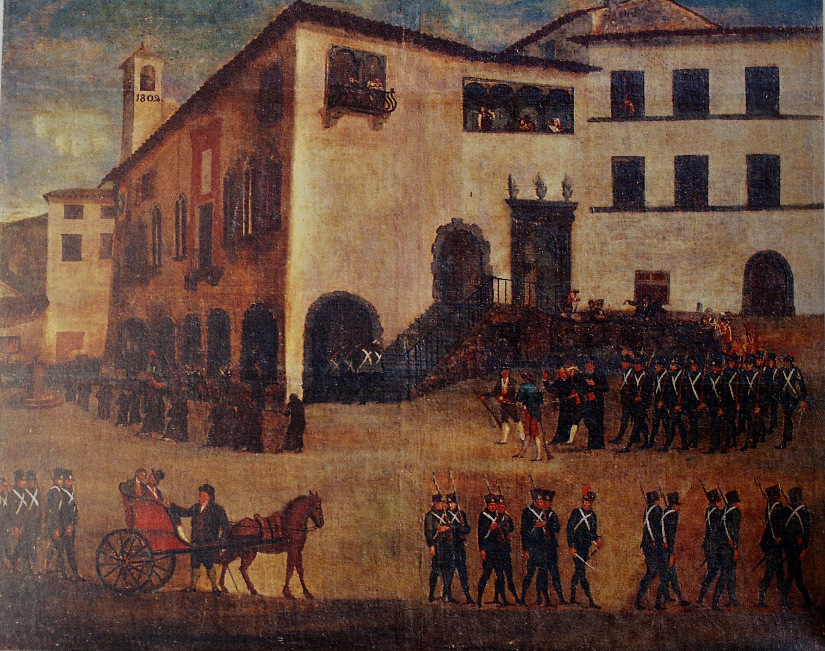 Riproduzione quadro rappresentazione fucilazione Luigi Bana 1797